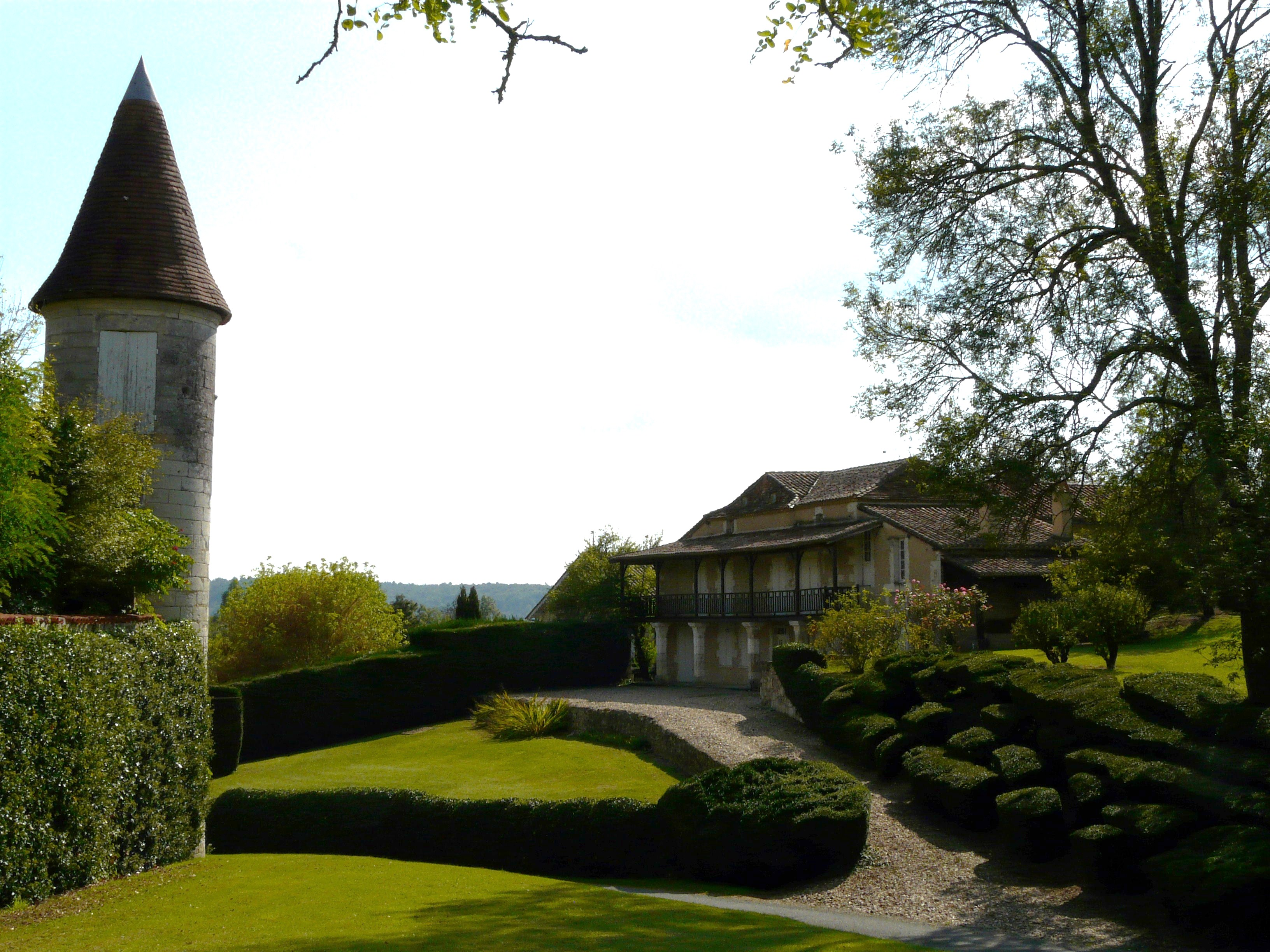 La tourelle sud-ouest du château de Mauriac et, à l'extérieur, une ancienne dépendance, Douzillac, Dordogne, France